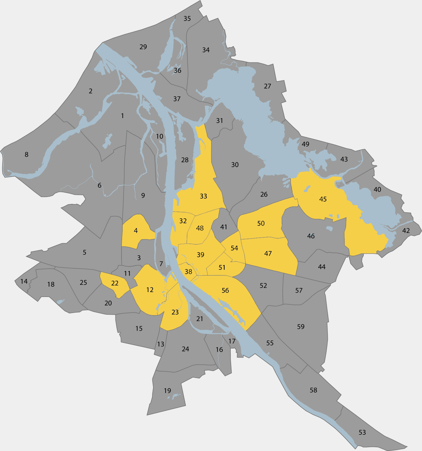 Interneta Pasaule - Rīgas Tīkls